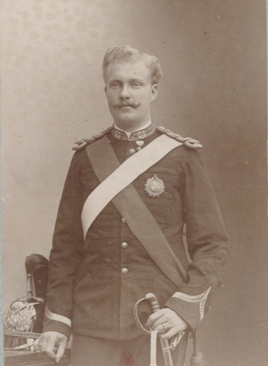 Charles 1er Duc de Bragance Roi du Portugal